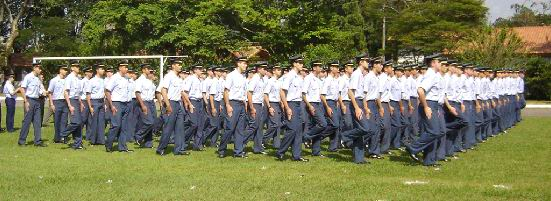 DescriÃ§Ã£o: Formatura dos alunos do CPOR-AER 2004 Fonte/CrÃ©ditos: minha autoria, criado por Davi Valle LicenÃ§a